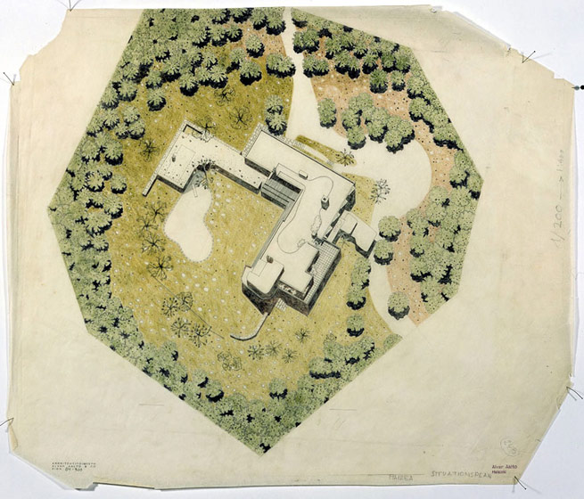 Emplazamiento